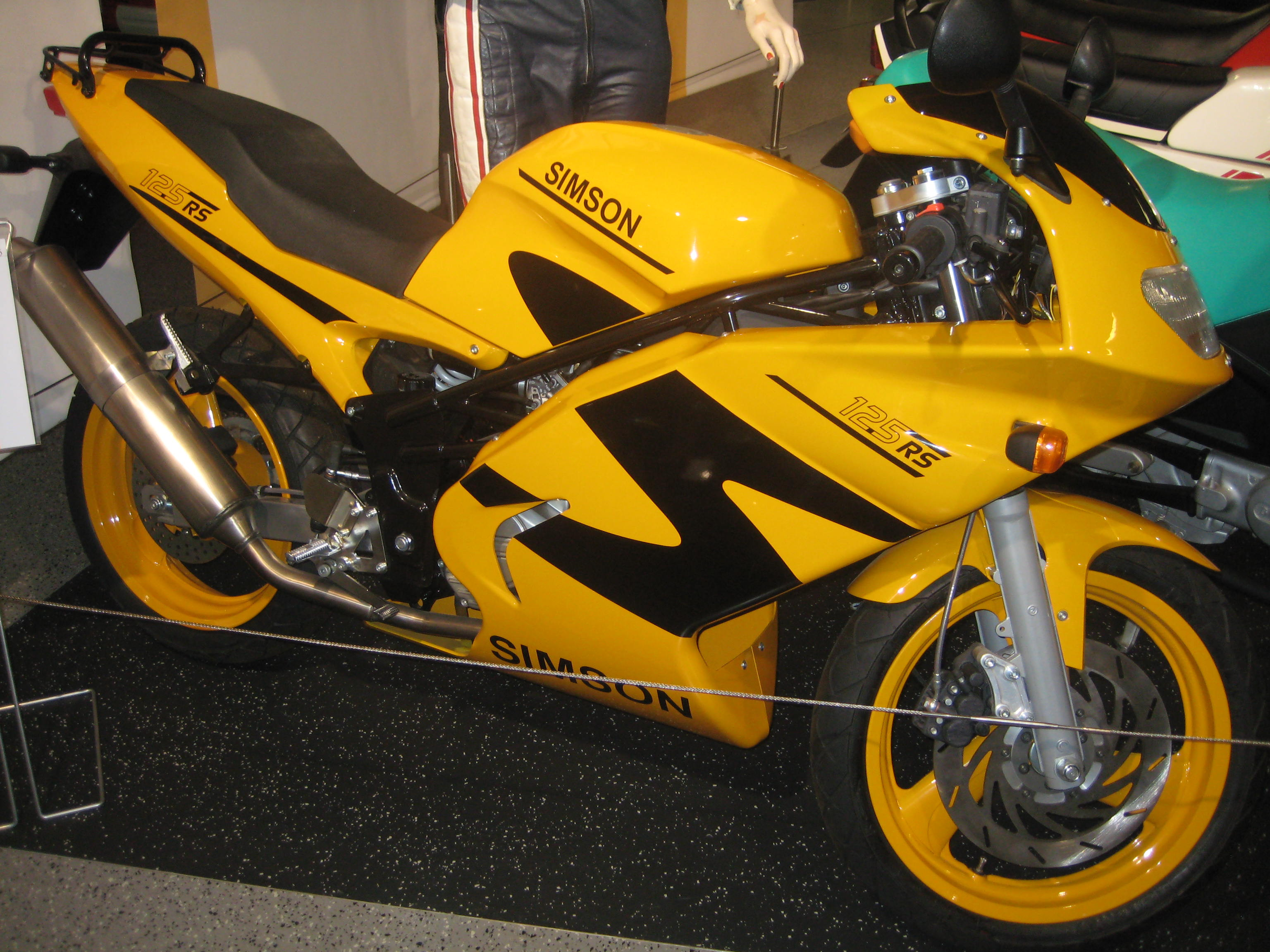 Zdjęcie przedstawiające motocykl Simson 125 RS będący eksponatem w Fahrzeugmuseum Suhl.